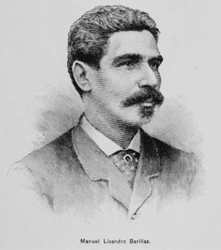 Grabado del libro Guatemala, the land of quetzal de William T. Brigham, publicado en 1887.